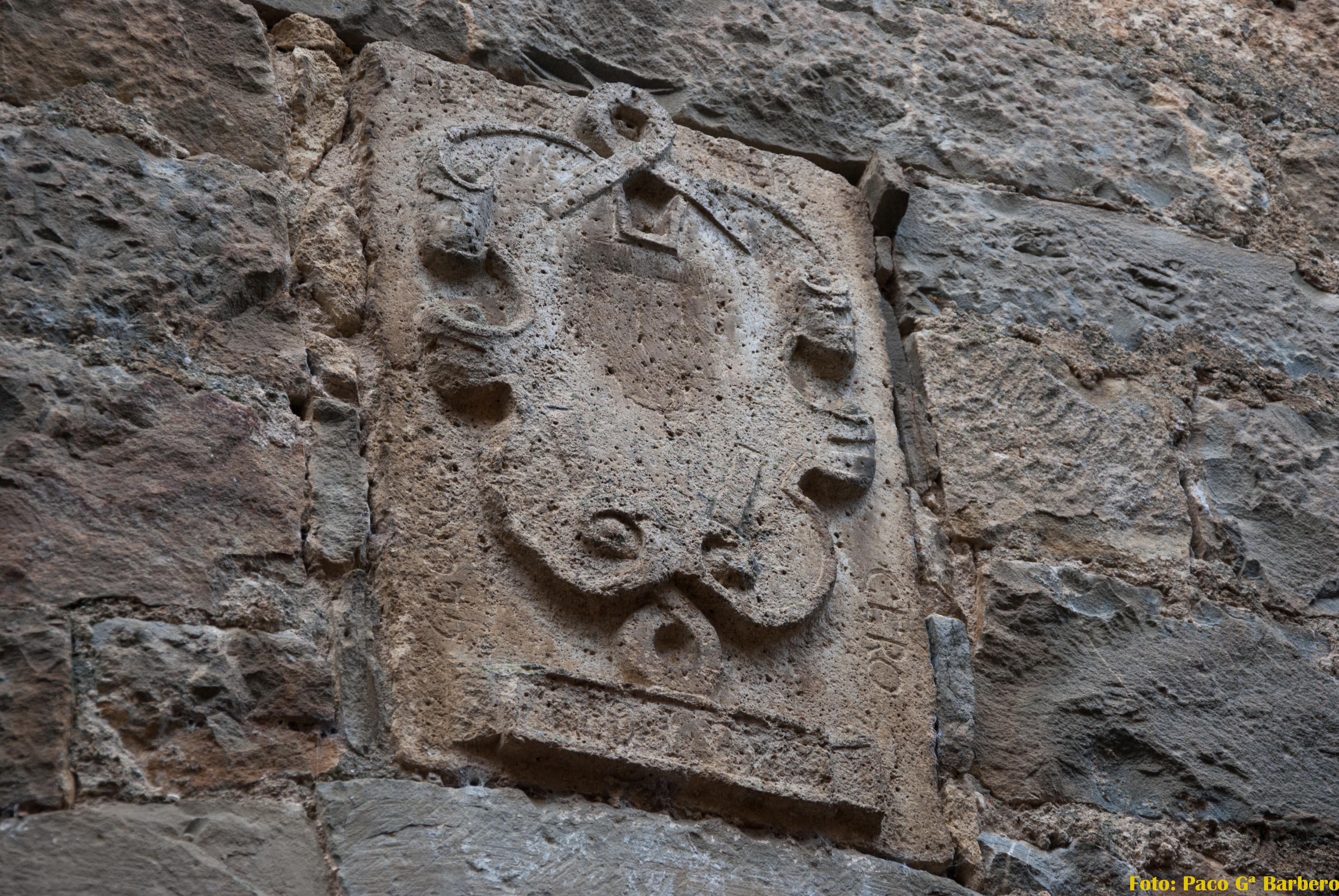 Escudo de los Pérez tallado en piedra